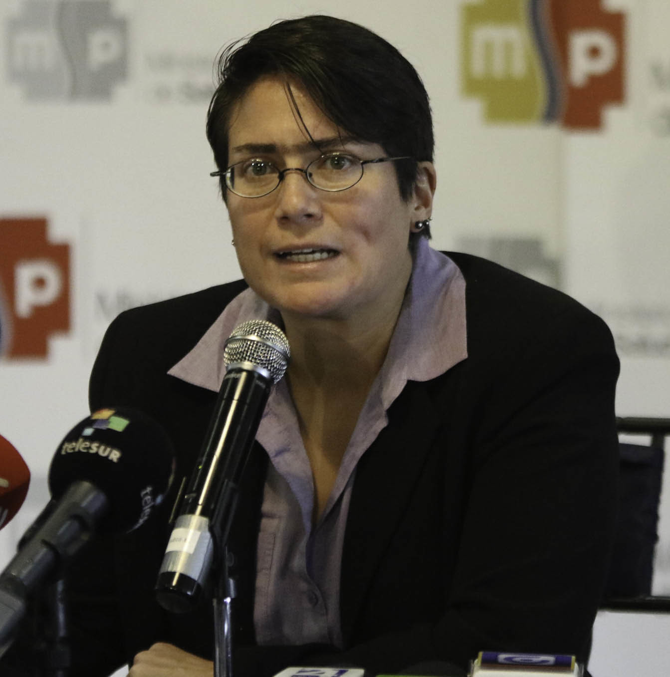 Quito, 03 ago (Andes).- Carina Vance, Ministra de Salud inauguró las mesas de diálogo de Calidad en la Salud, donde participan gremios profesionales de la salud, sociedades científicas, entre otros. ANDES/Micaela Ayala V.